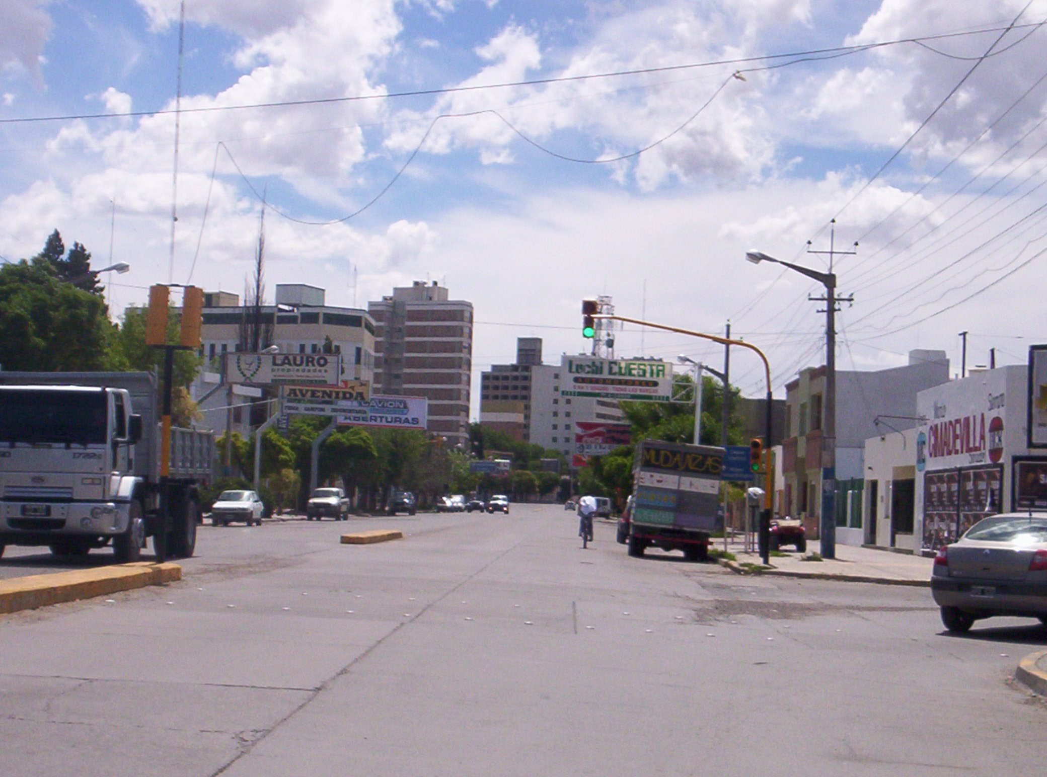 centro de trelew por avenida irigoyen